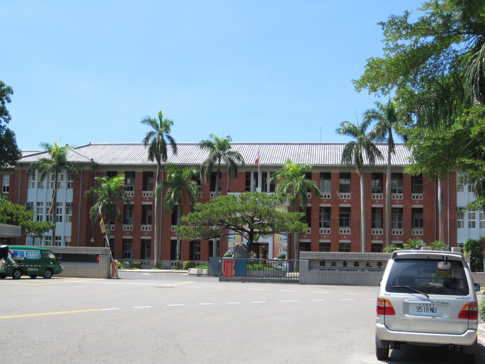 中文（台灣）: 原臺南師範學校本館